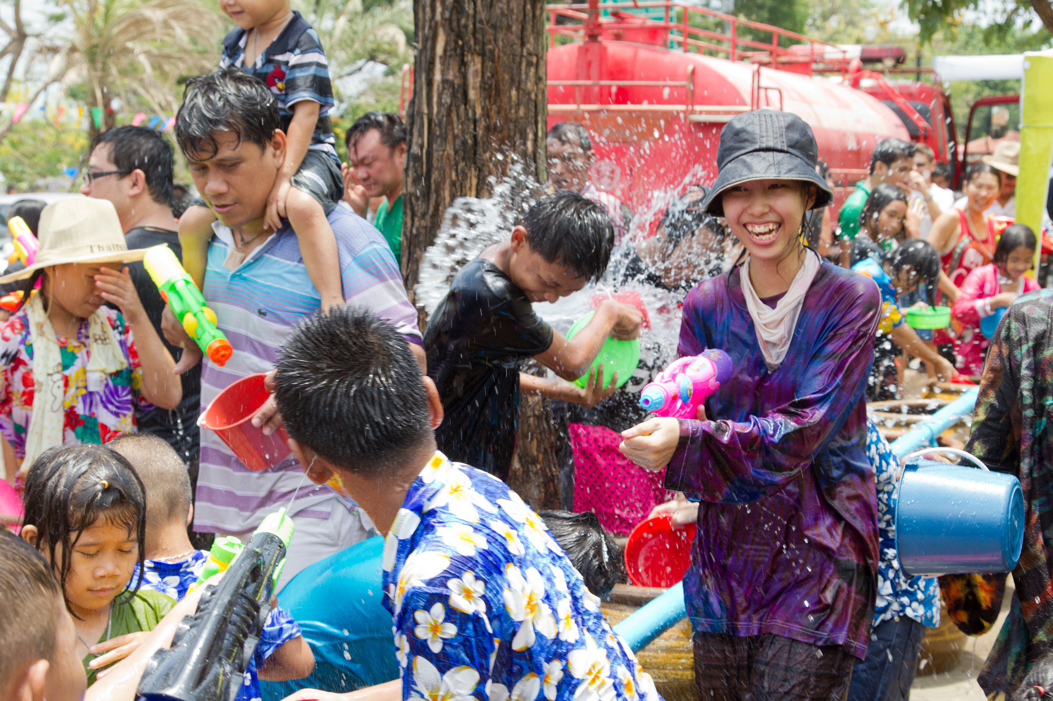 Songkran in Ayutthaya, Ayuttaya Province, Thailand